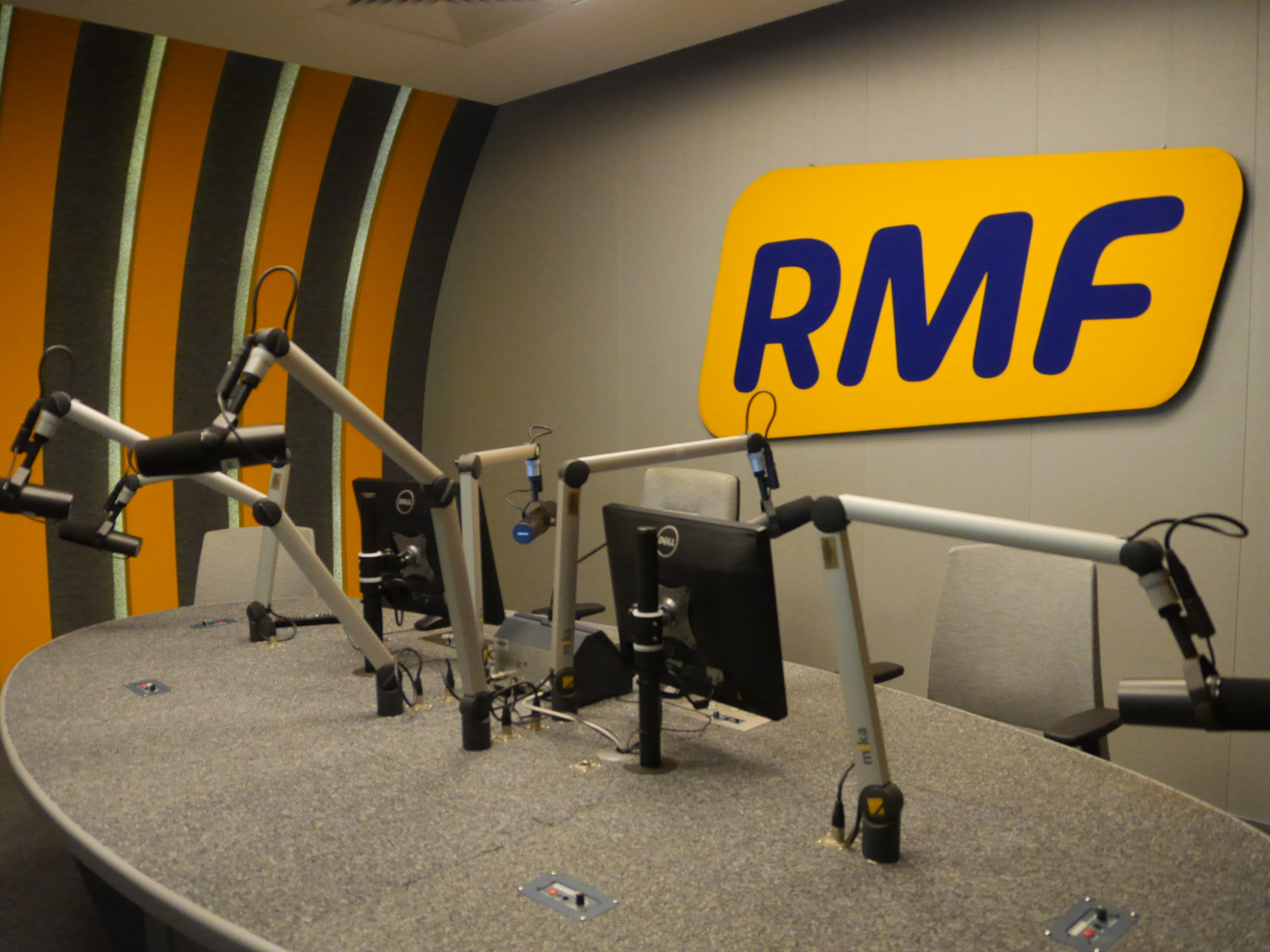 Siedziba radia RMF FM, al. Waszyngtona 1, 30-204 Kraków This photo was taken with Panasonic Lumix DMC-GH3 camera, thanks to Panasonic. You can see all photographs in category: Taken with Panasonic Lumix DMC-GH3.